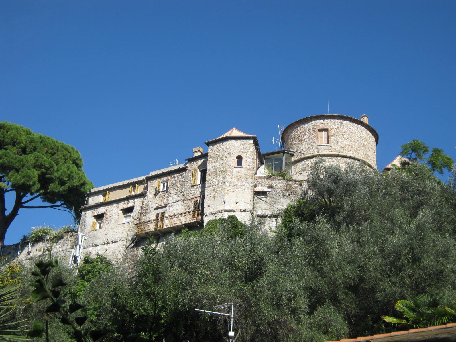 Portofino, Bruine Kasteel.